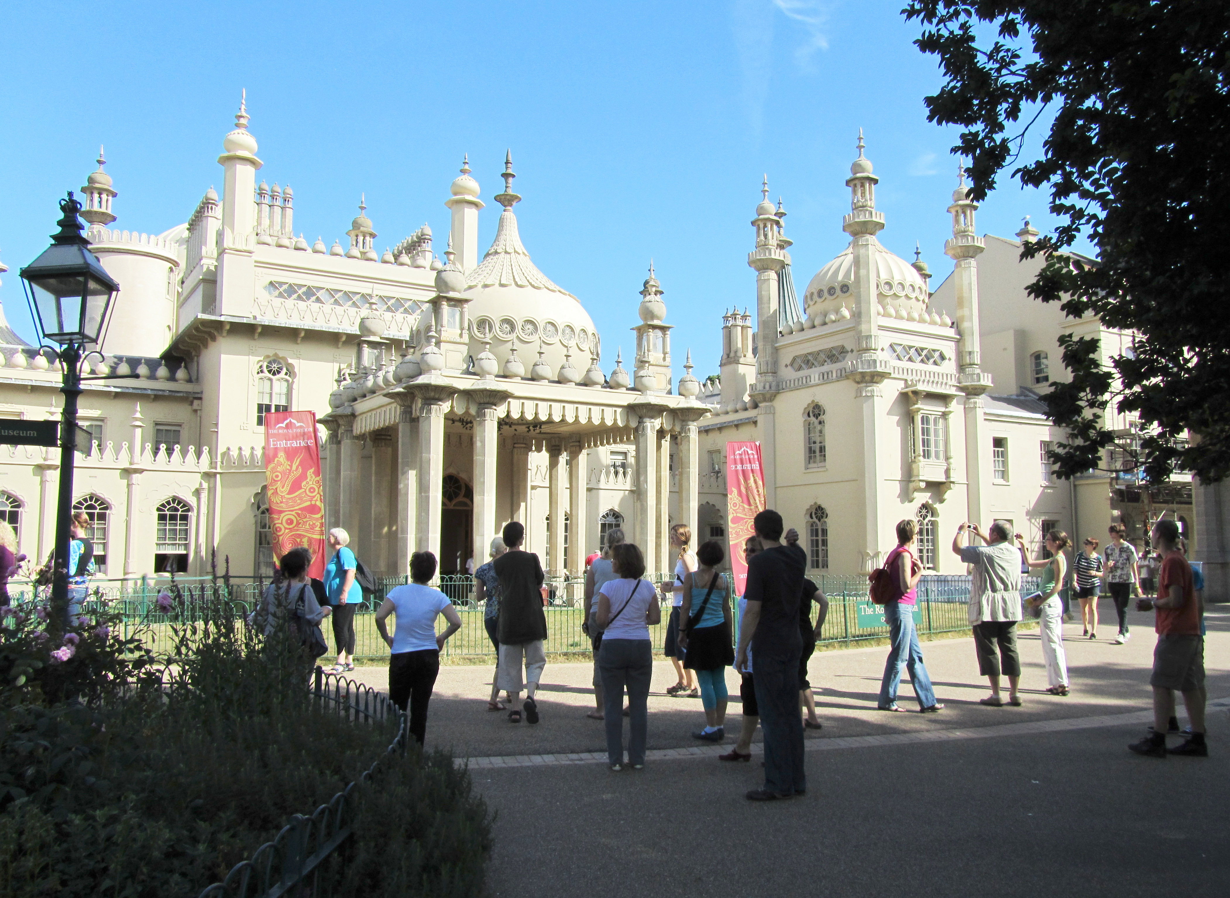 Brighton, East Sussex